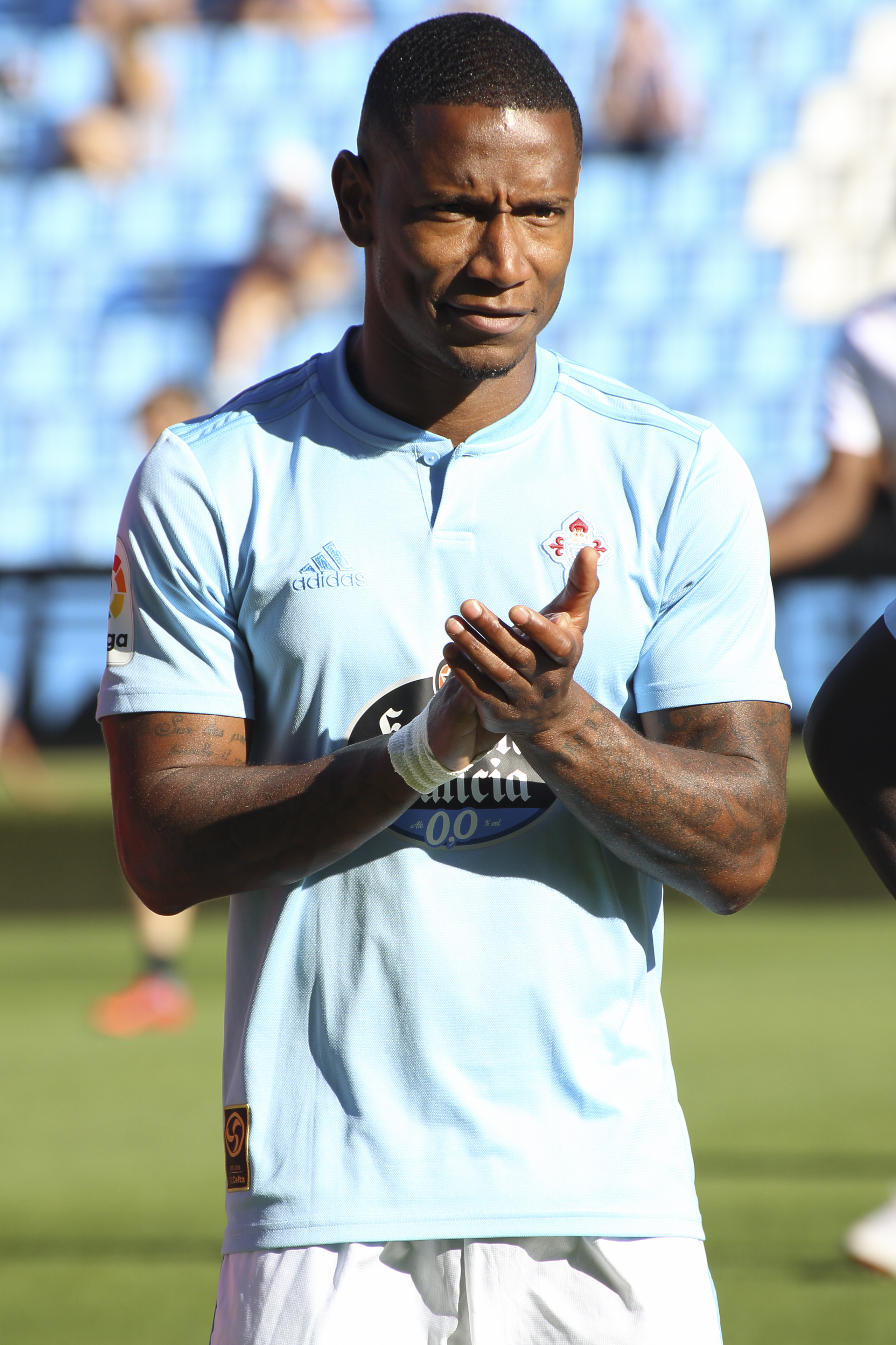 Presentación RC Celta - Temporada 18/19